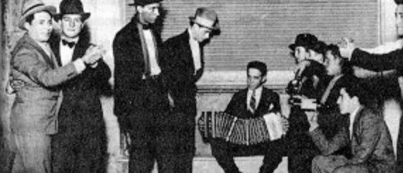 Buenos Aires. Jovenes bailando (entre hombres) y escuchando tango. Ca. 1900